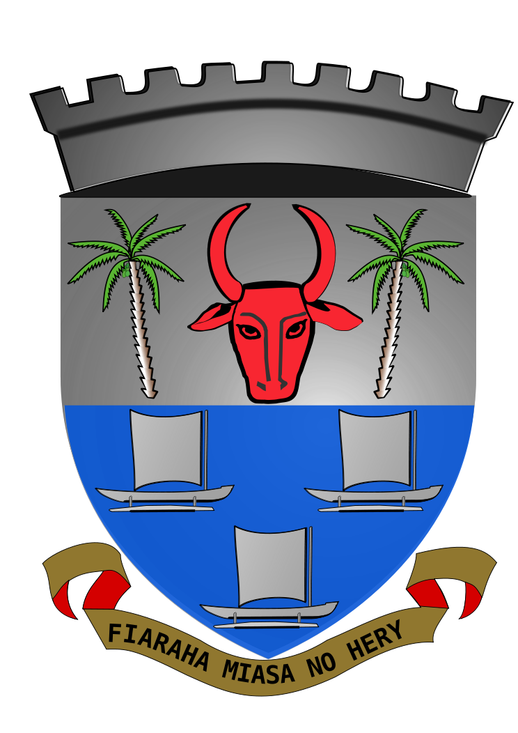 Blason de MAINTIRANO